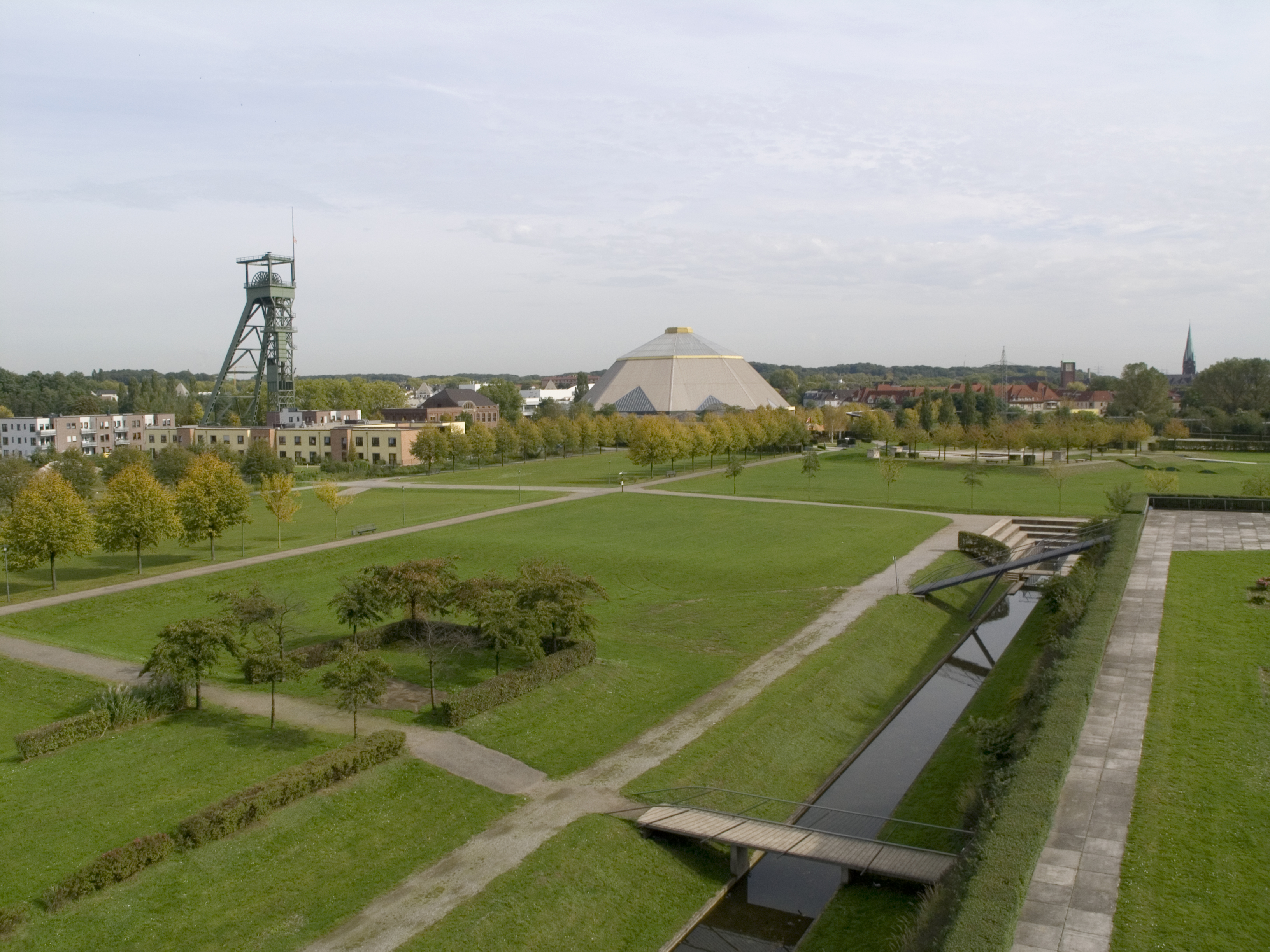 Северный Рейн - Вестфалия, Оберхаузен - OLGA-парк